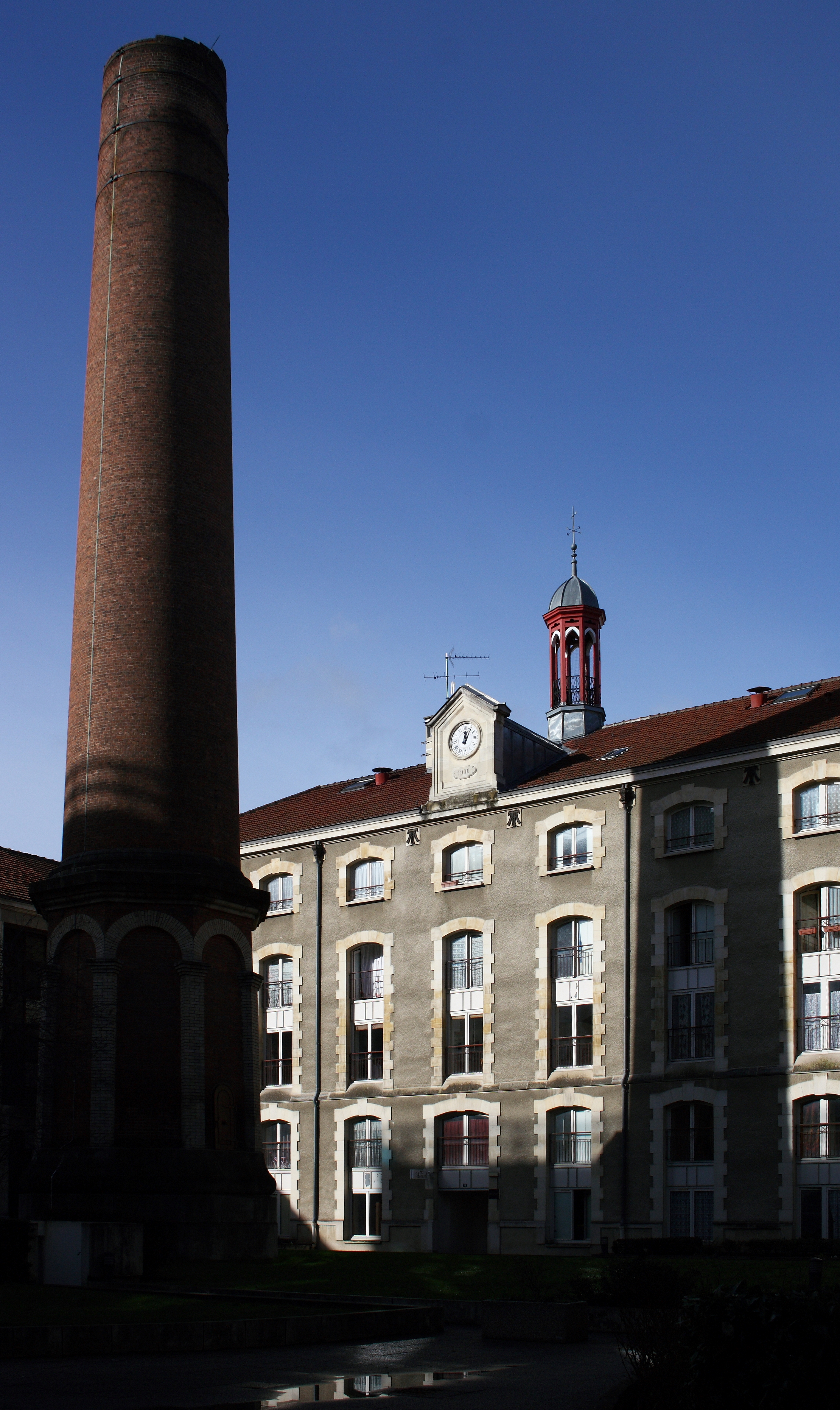 Ehemalige Tabakmanufaktur in Issy-les-Moulineaux im Département Hauts-de-Seine (Région Île-de-France), Rue Ernest Renan N° 17; Kamin im Innenhof, mittleres Gebäude mit Uhr und Glockenturm